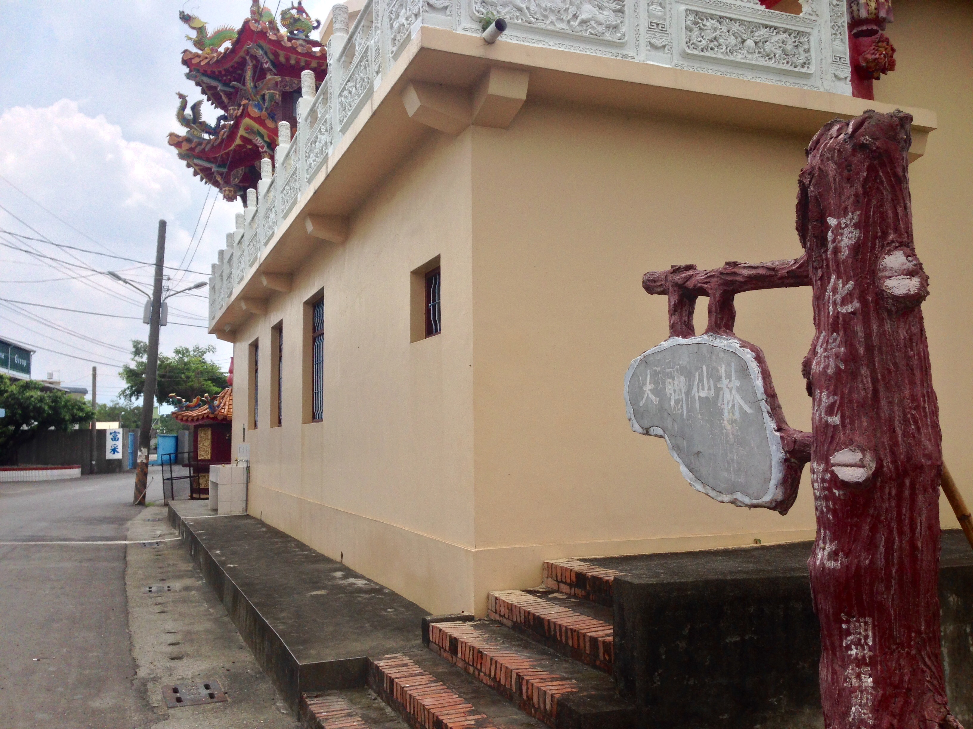 中文（台灣）: 潮州大腳仙林路牌